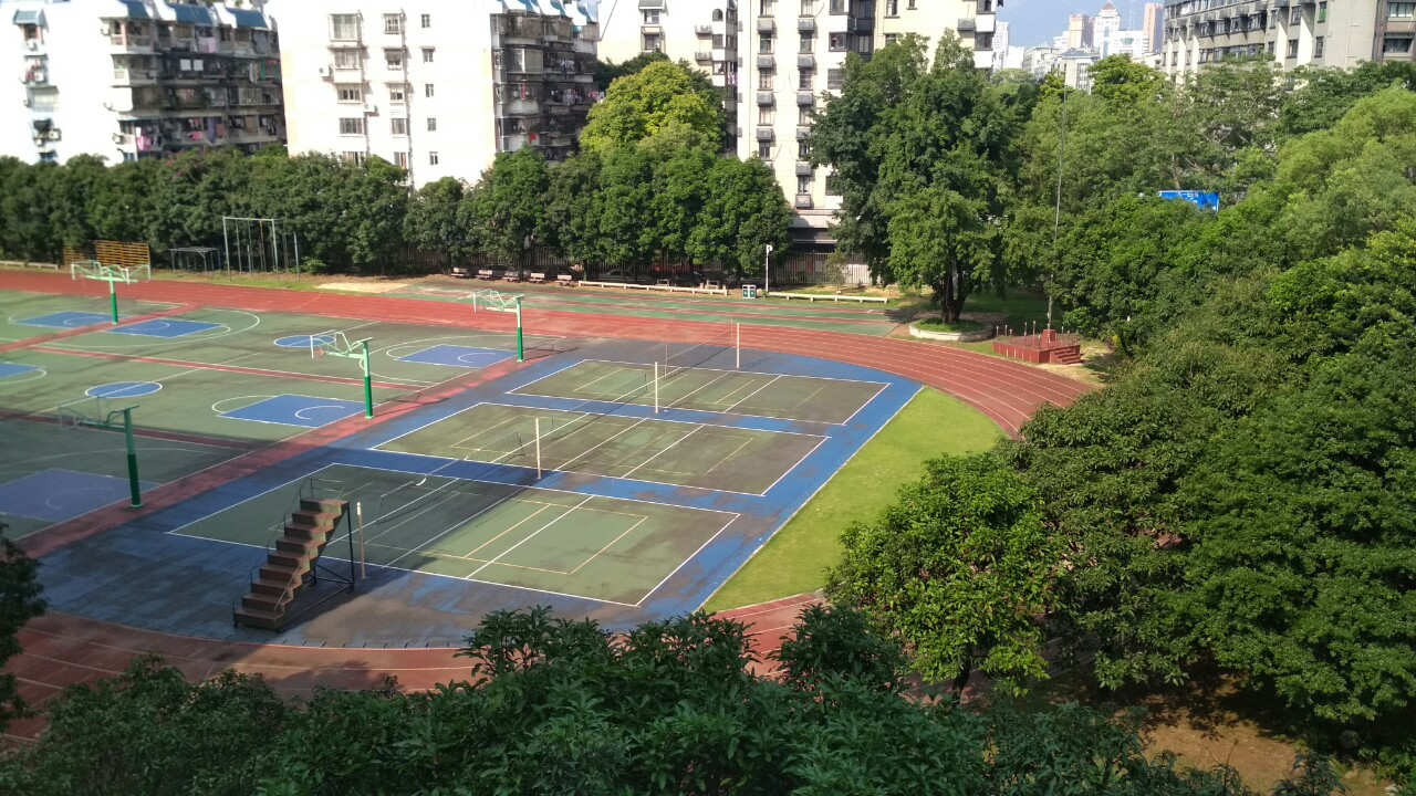 福州二中操场一瞥，摄自教学楼四层。